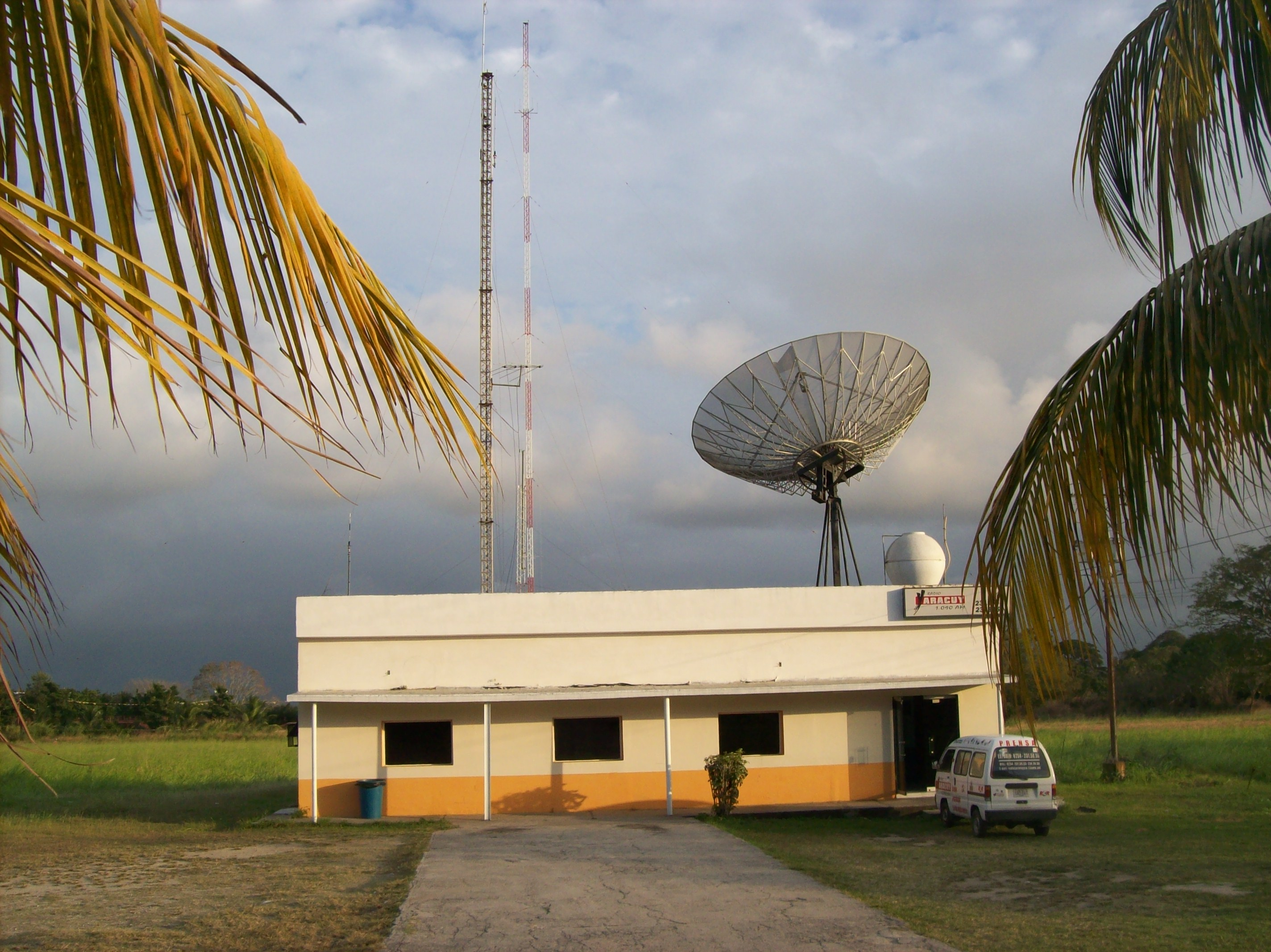 Yaracuy 1090 AM.